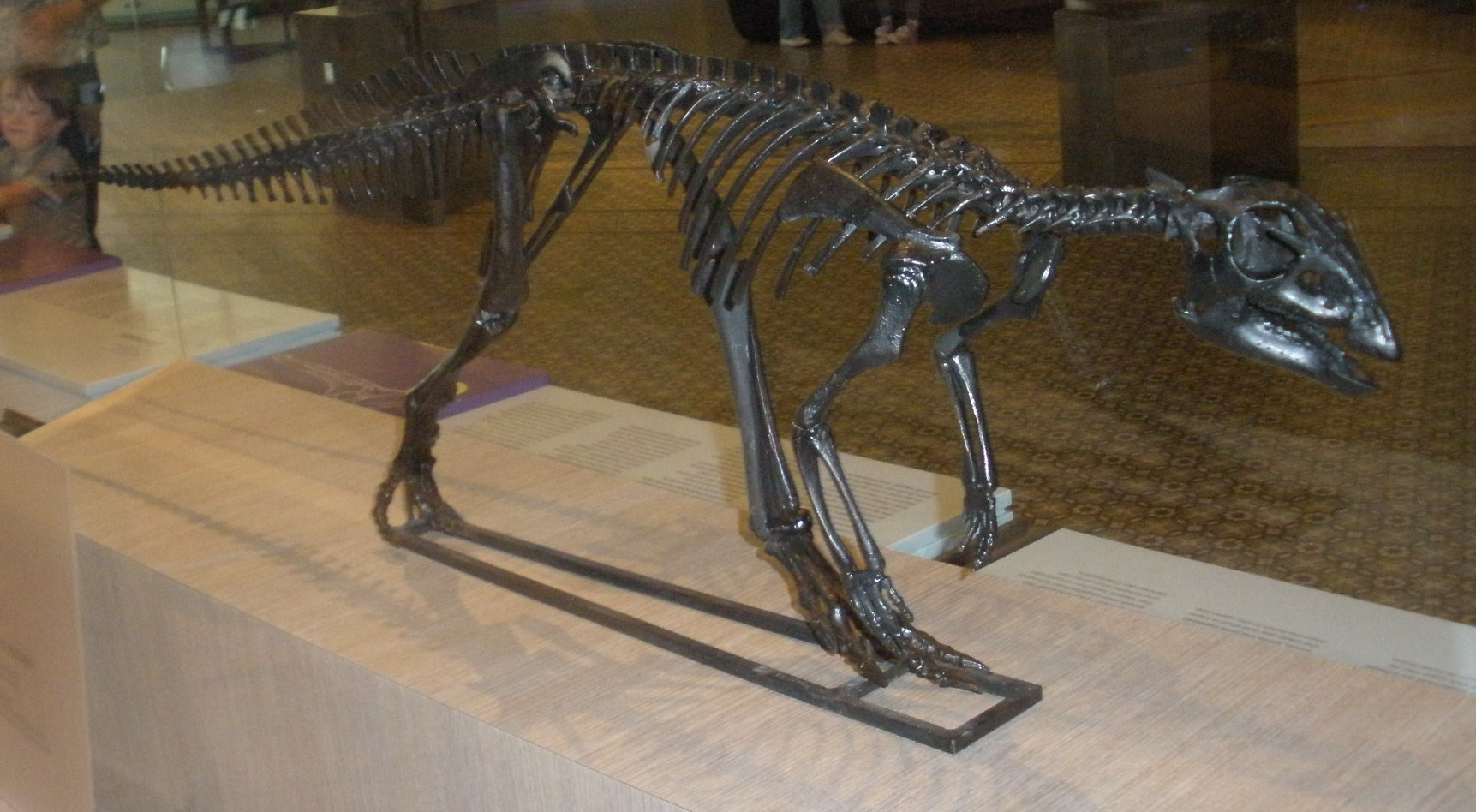 Fossil of Hypsilophodon, an ornithopod dinosaur Took the photo at Musee d'Histoire Naturelle, Brussels